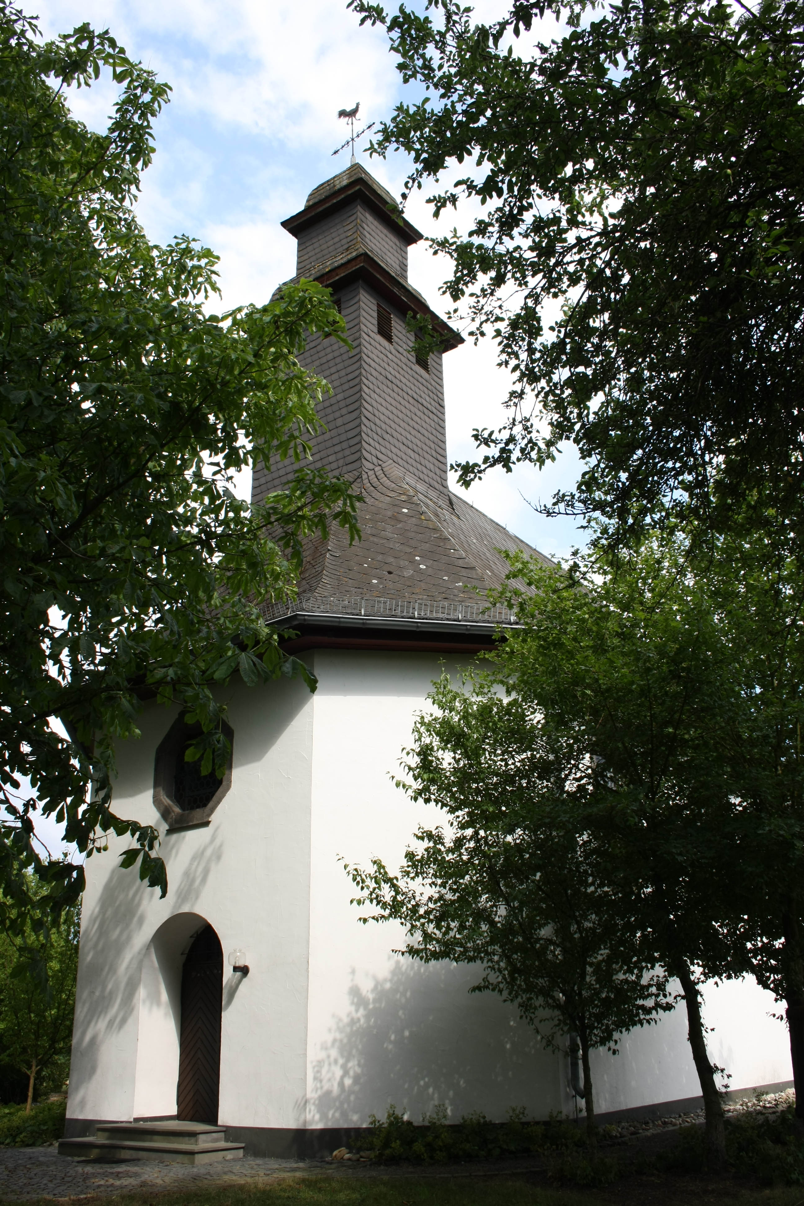 Katholische Kapelle St. Barbara in Pitscheid, einem Ortsteil von Hümmel, Erweiterung durch den Architekten Theodor Wildemann 1922/23